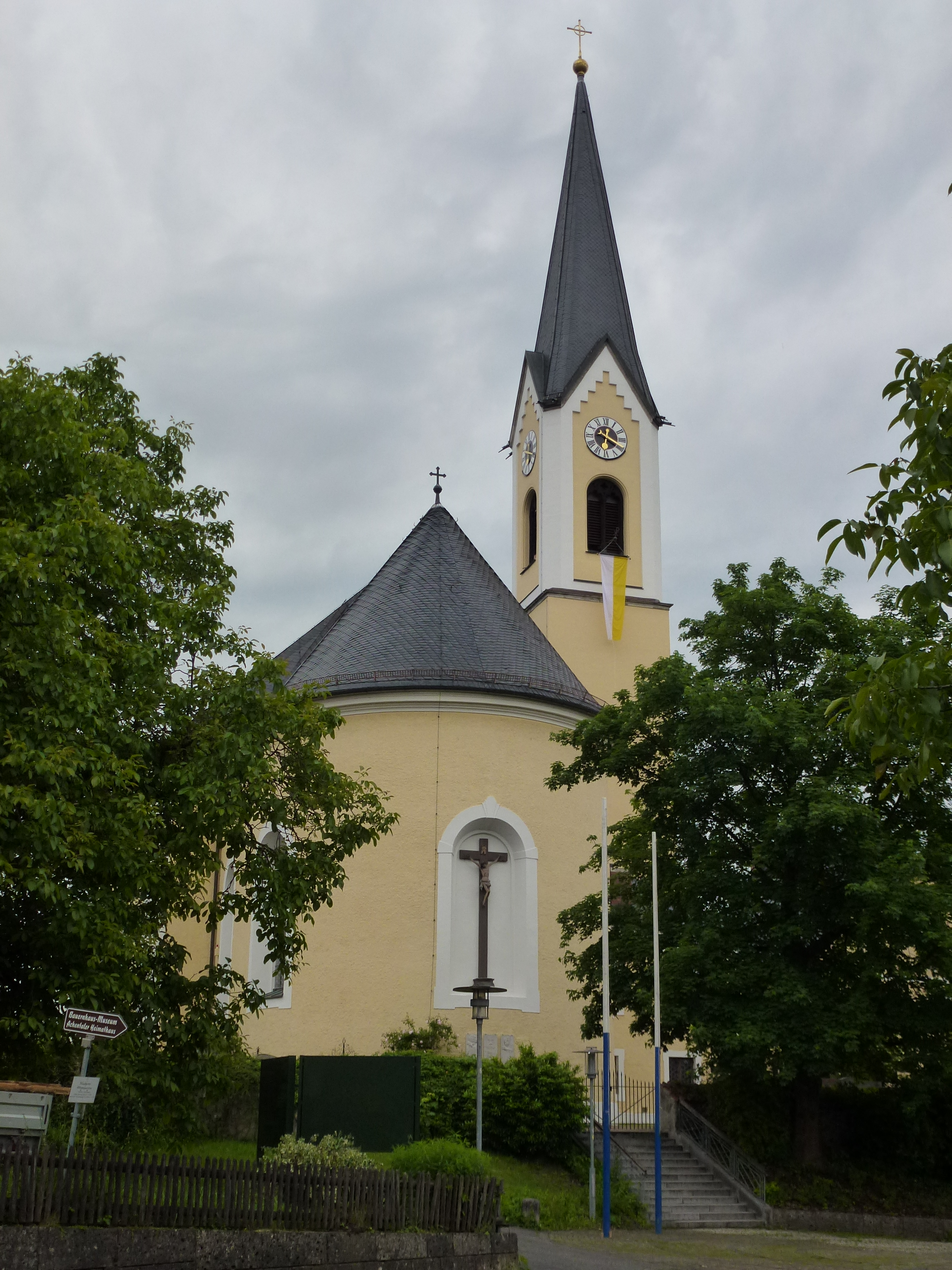 Kath. Pfarrkirche St. Jakobus - St.-Jakobus-Platz 1, Rohrdorf am Inn